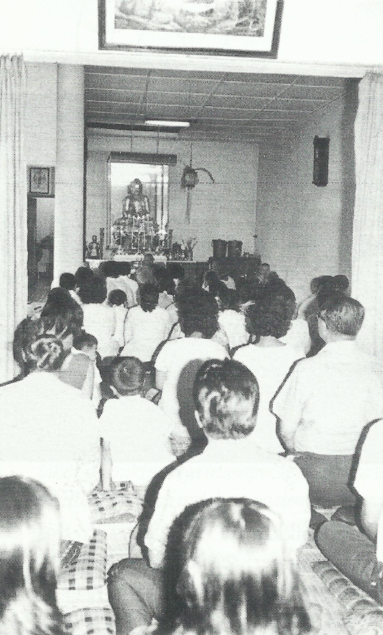 Suasana kebaktian di masa lalu. Bhaktisala memang perlu diperbesar.